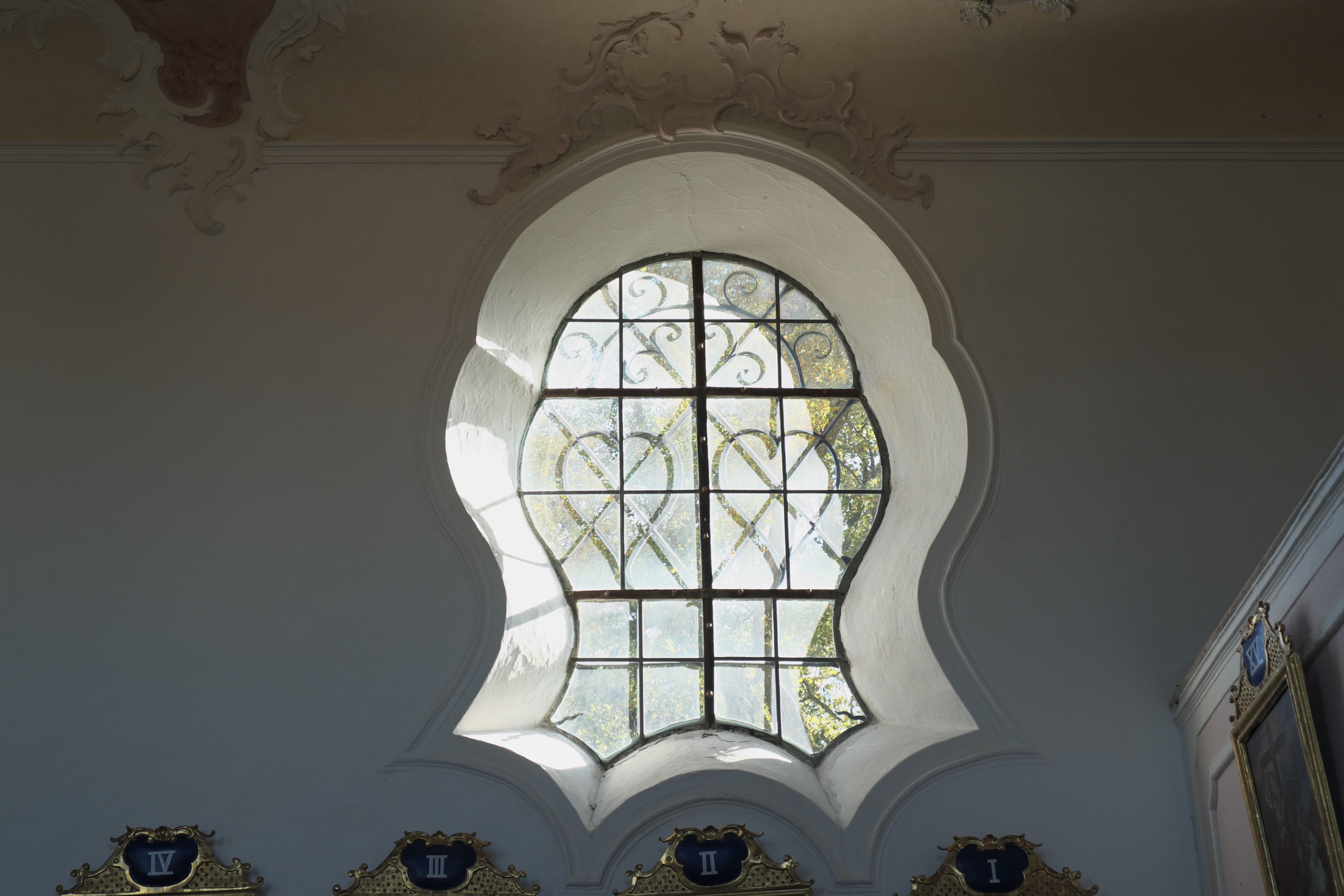 Katholische Filialkirche Unsere Liebe Frau in Petzenhausen, einem Ortsteil von Weil (Oberbayern) im Landkreis Landsberg am Lech (Bayern/Deutschland), Bassgeigenfenster